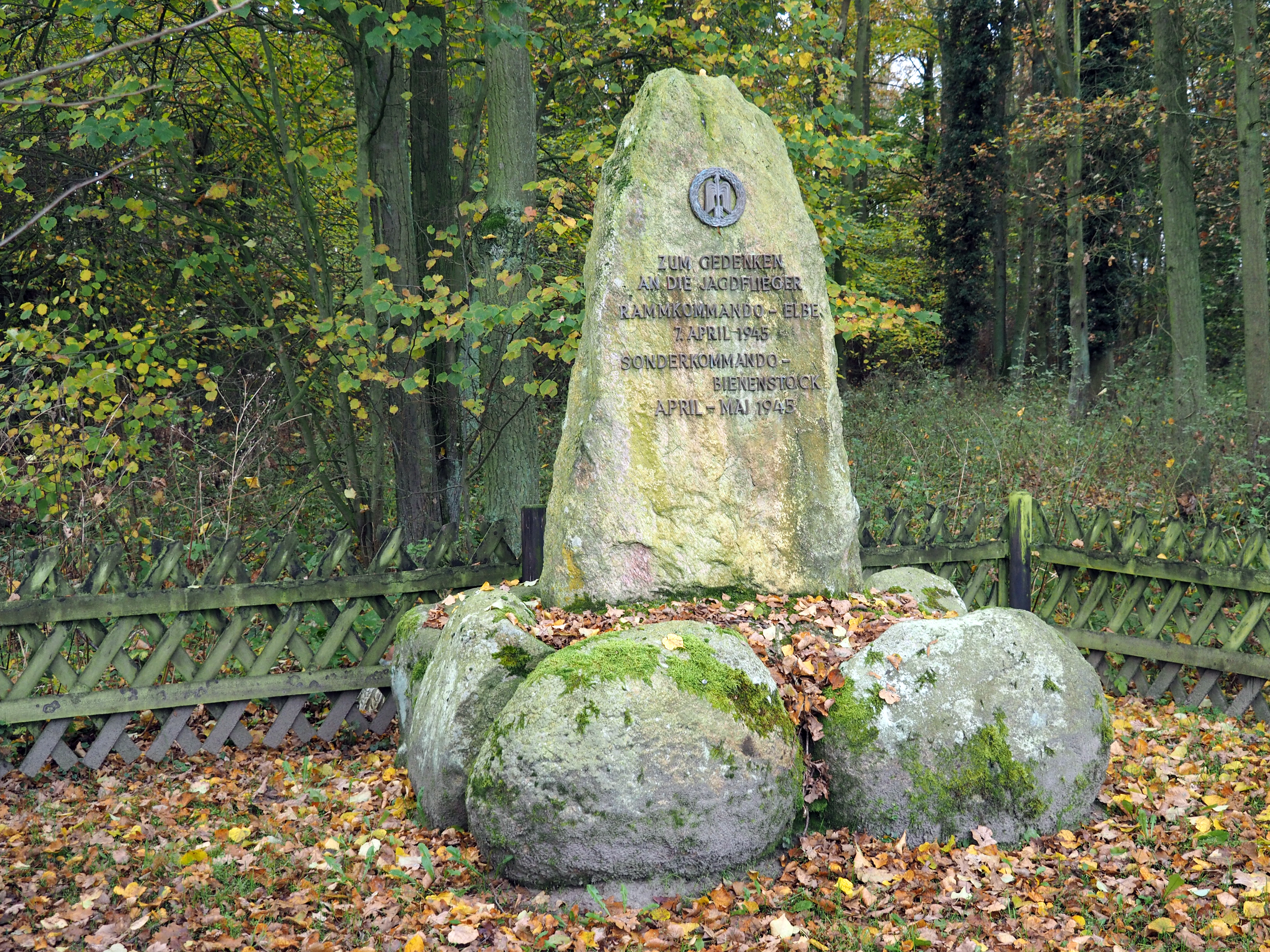 Gedenkstein nördlich von Bockelskamp (Gemeinde Wienhausen) für das Rammkommando Elbe und Sonderkommando Bienenstock.